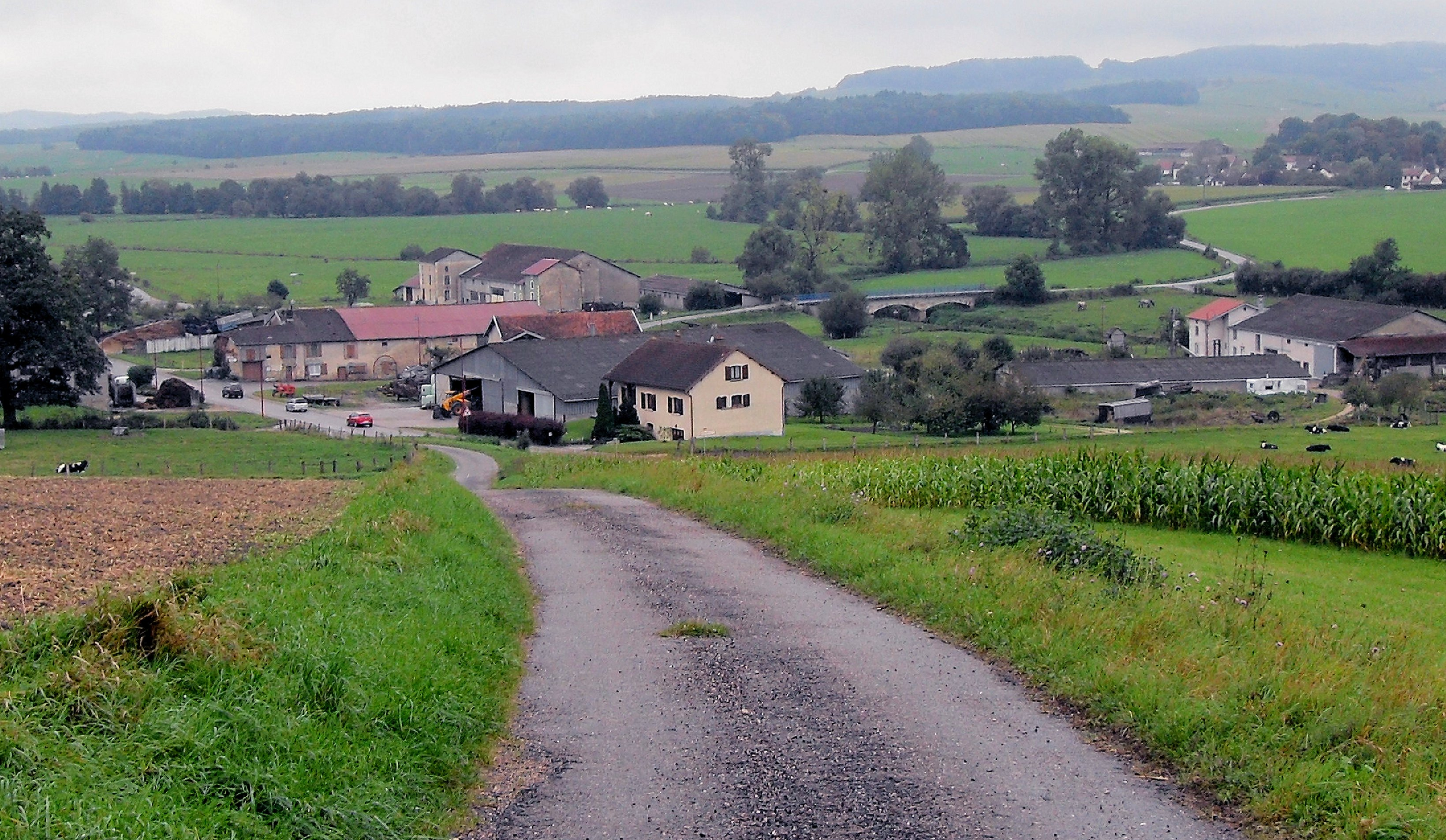 Vue depuis le nord-est sur Maroncourt